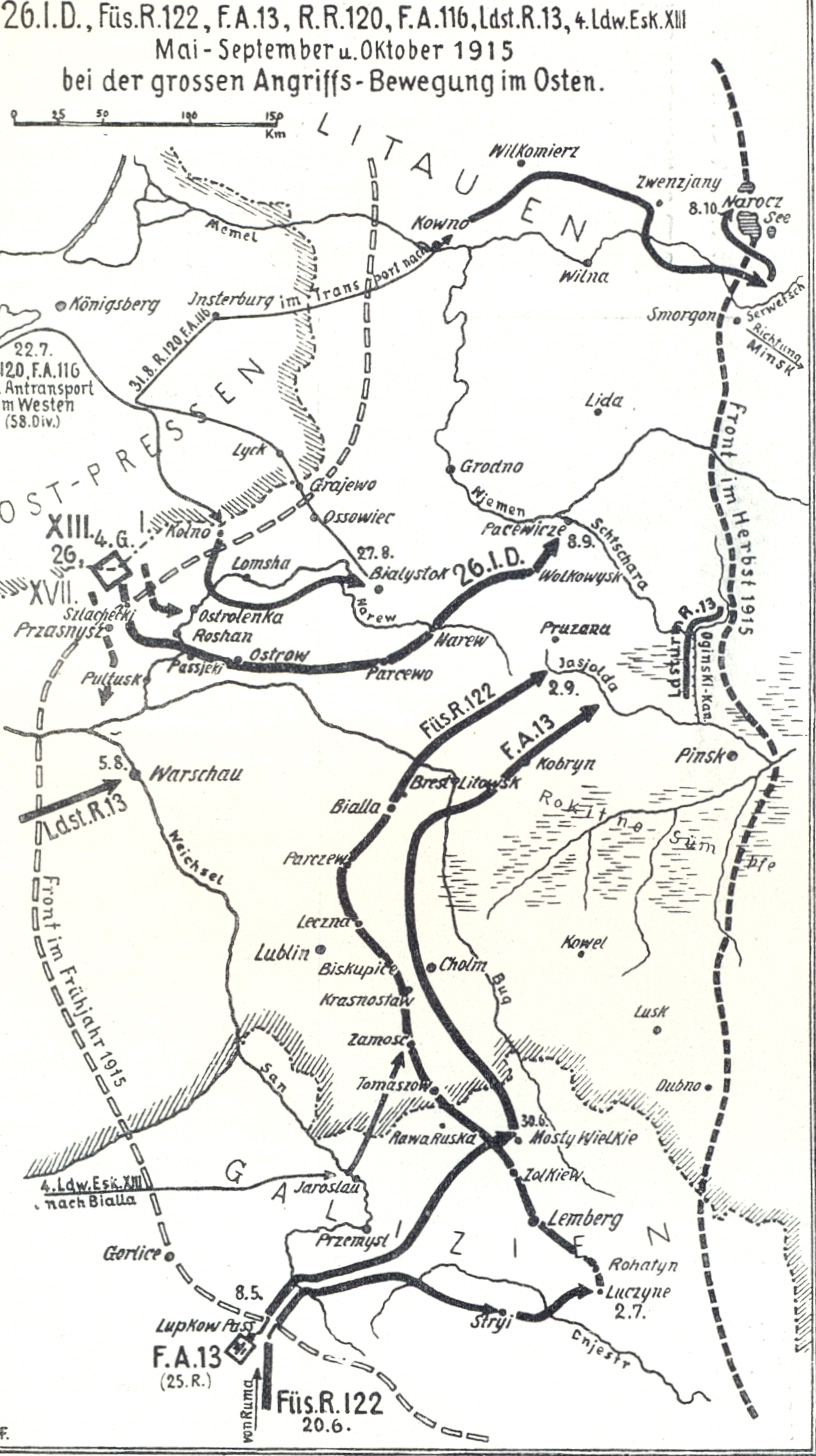 Karte Seite 44: 26. I.D., Füs.Regt. 122, R.R. 120. Feldart.Abt. 116, Lst.Regt. 13, Ldw.Esk. XIII Mai bis September und Oktober 1915 bei der großen Angriffs-Bewegung im Osten